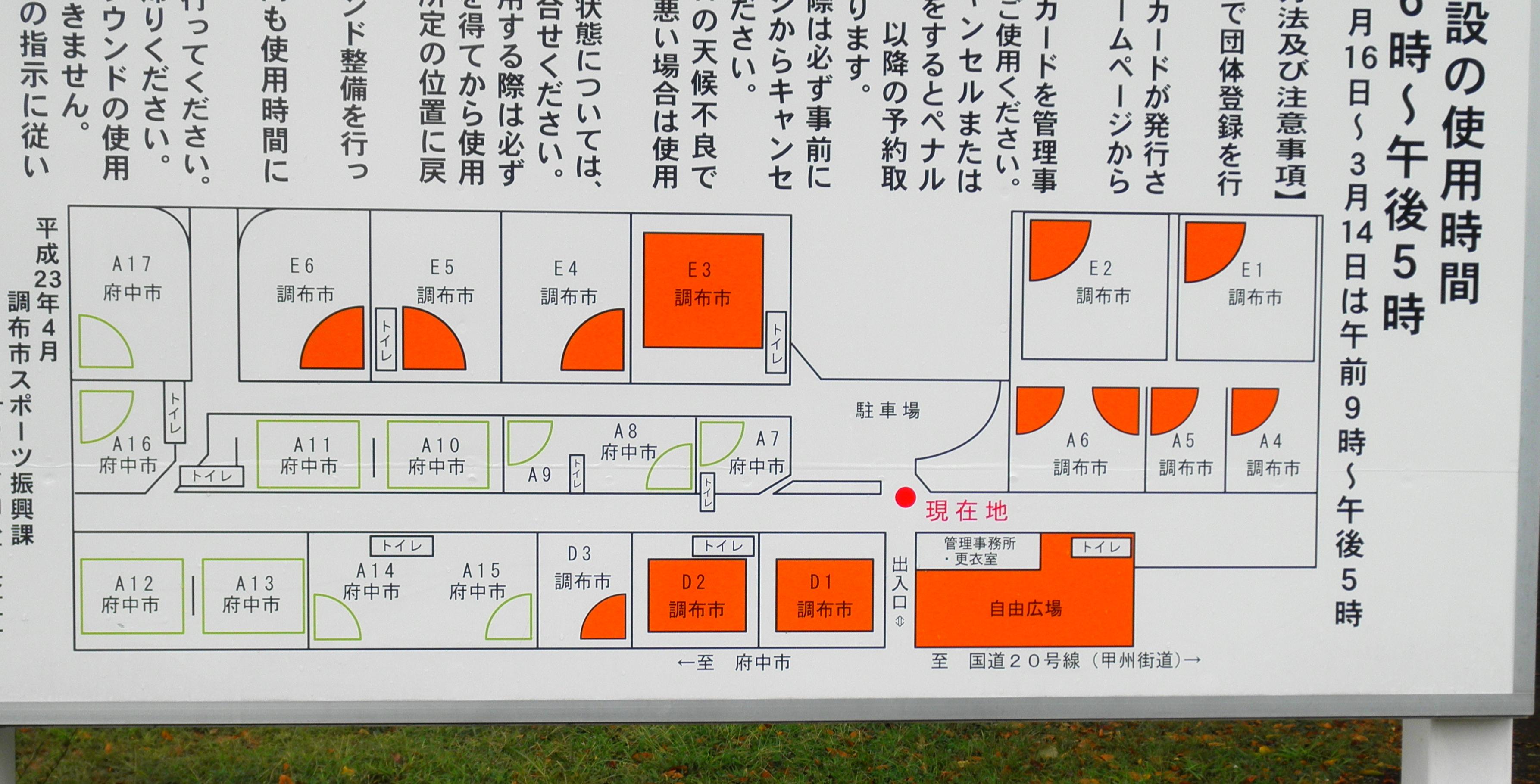 調布基地跡地運動広場（看板）